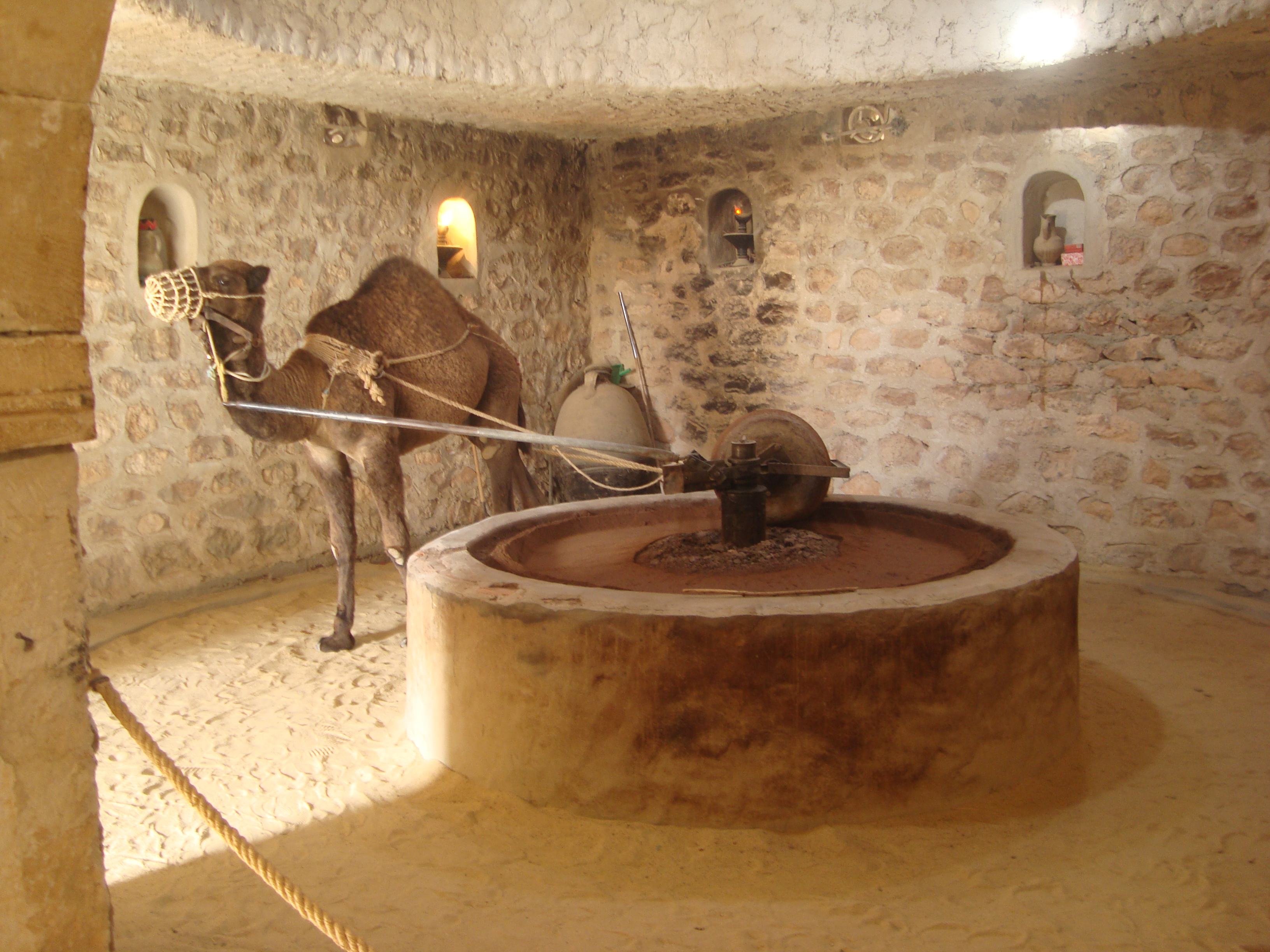 Vue de l'huilerie reconstituée au Musée de Guellala sur l'île de Djerba